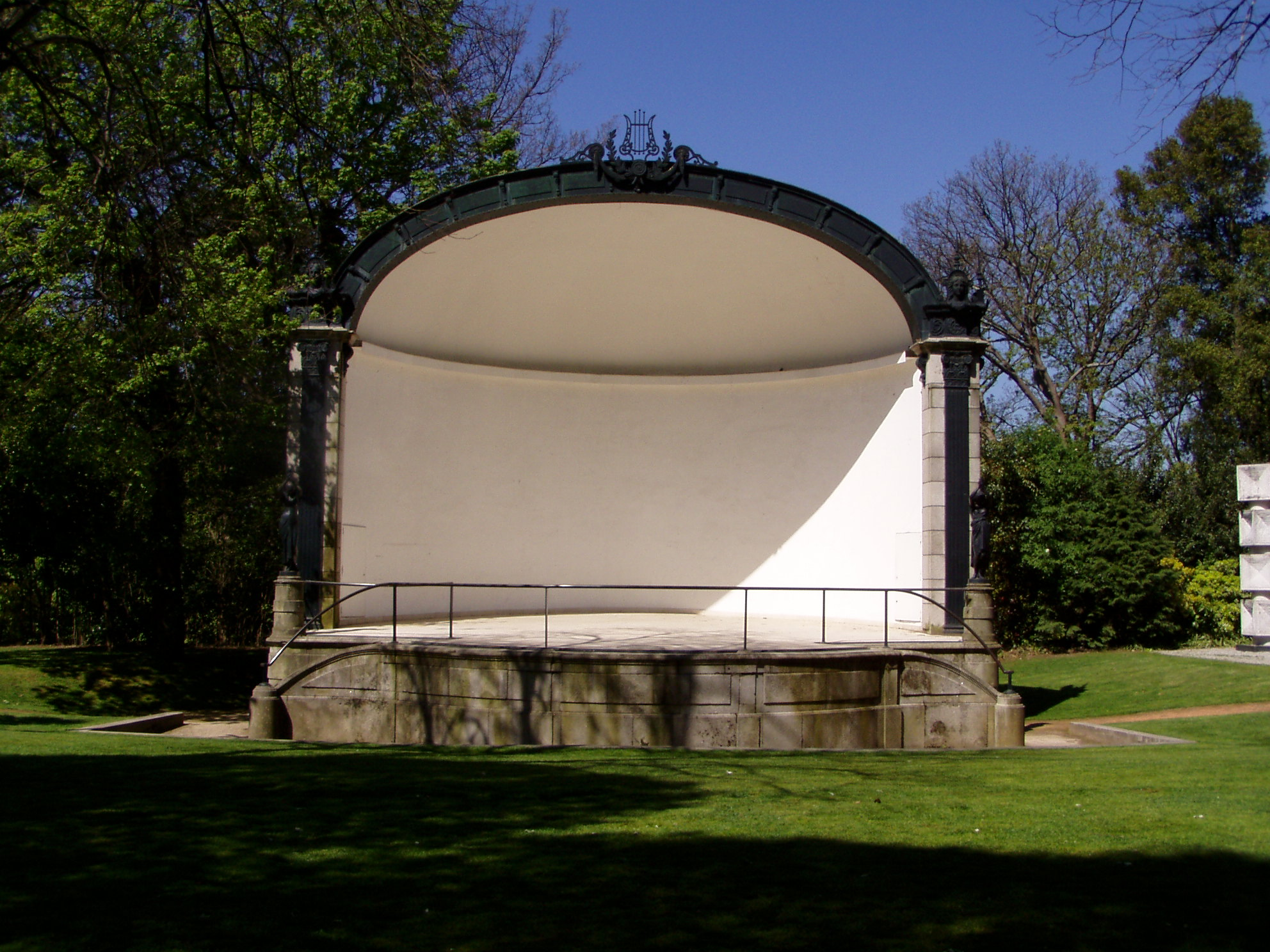 Concha acústica (acoustic shell), Palácio de Cristal, Porto, Portugal. This is a coreto